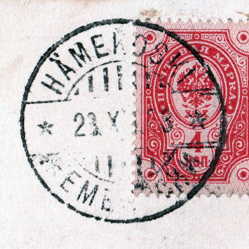 Почтовый штемпель Хямекоски (подписано "Хемекоски"). Видна дата 23 декабря 1903 года и название населённого пункта на финском и русском языках